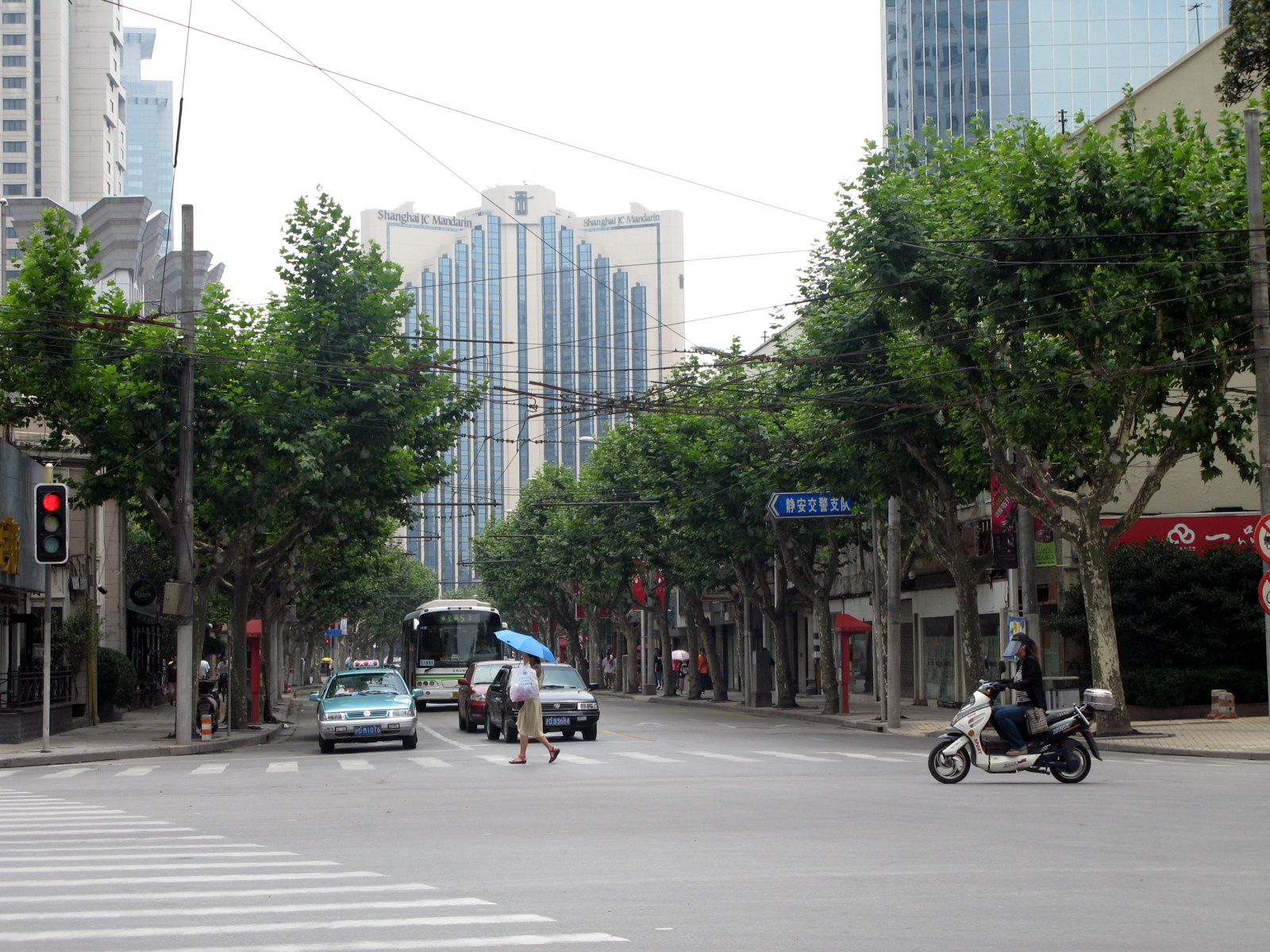 上海靜安區 Shanghai Jing'an District